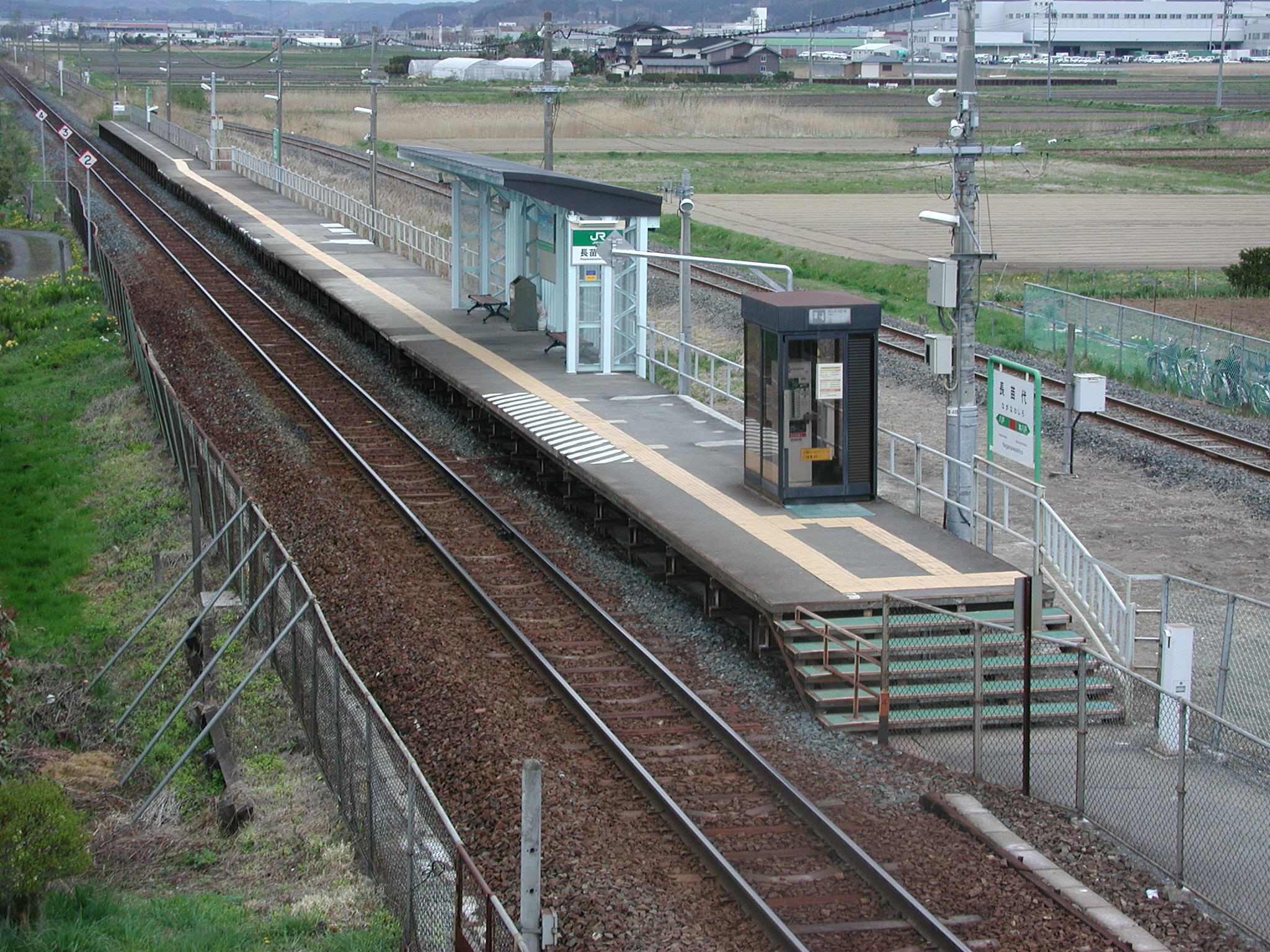 東日本旅客鉄道(JR東日本)八戸線(愛称「うみねこレール八戸市内線」区間内)：長苗代駅 跨線橋からの全景